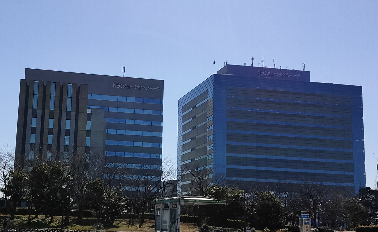 ＮＥＣソリューションイノベータ株式会社本社ビル